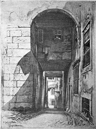 Esta imagem (em domínio público por morte do autor há mais de 75 anos) faz parte de um conjunto de 100 aguarelas e gravuras criadas em 1910-1920 e publicadas no livro Lisboa Velha (Afonso Lopes Vieira (prefácio). Anuário Comercial: Lisboa, 1925).